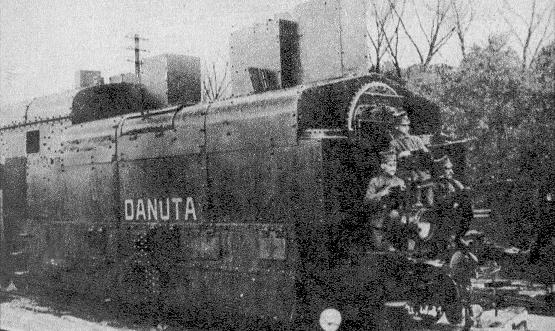 Pociag pancerny powstancow wielkopolskich Danuta w 1919 r.